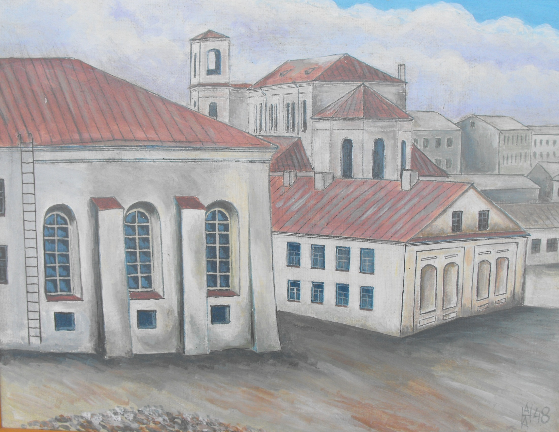 Минск, вид с площади Свободы на Немигу, 1948 год. Слева "Холодная" синагога, а ниже - хедер на Немиге. Написано в 1968 г. по акварели 1948 г. Яичная темпера. ДВП. Художник - Анатолий Наливаев.